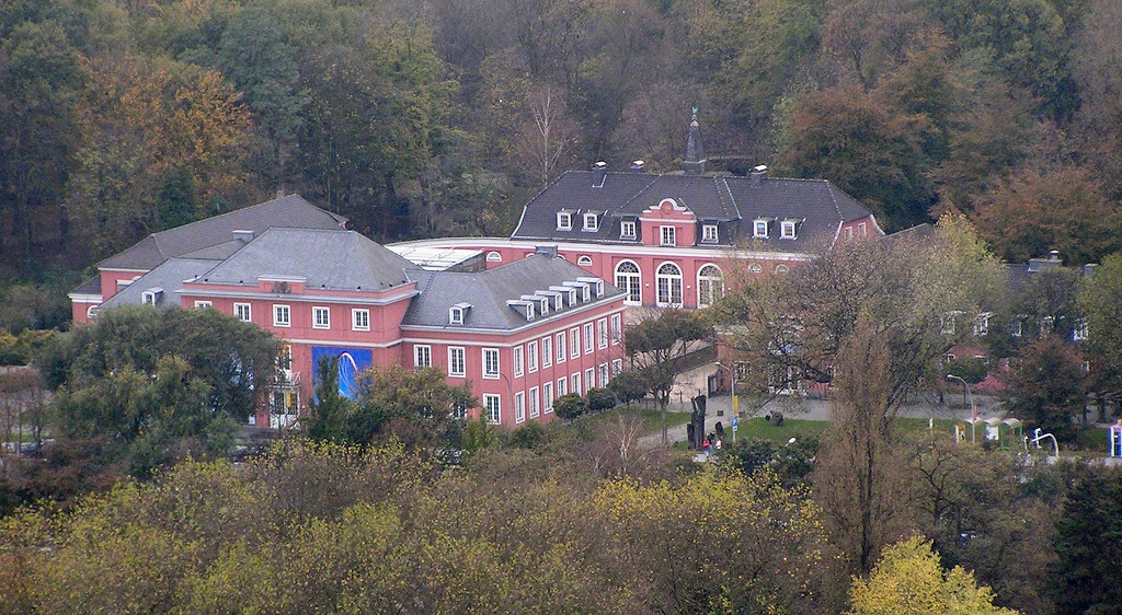 Schloss Oberhausen, vom Gasometer gesehen